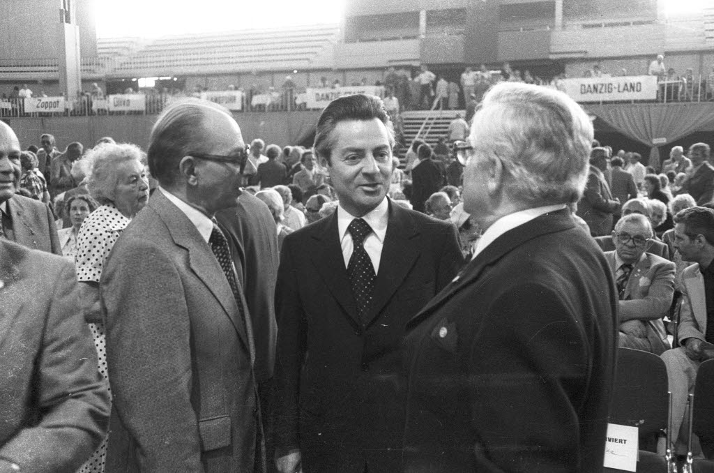 Treffen von Heimatvertriebenen mit 5.000 Teilnehmern. Im Bild u.a. der Bundesvorsitzende des Bundes der Danziger Helmut Roick (links) und Landessozialminister Walter Braun (Bildmitte).